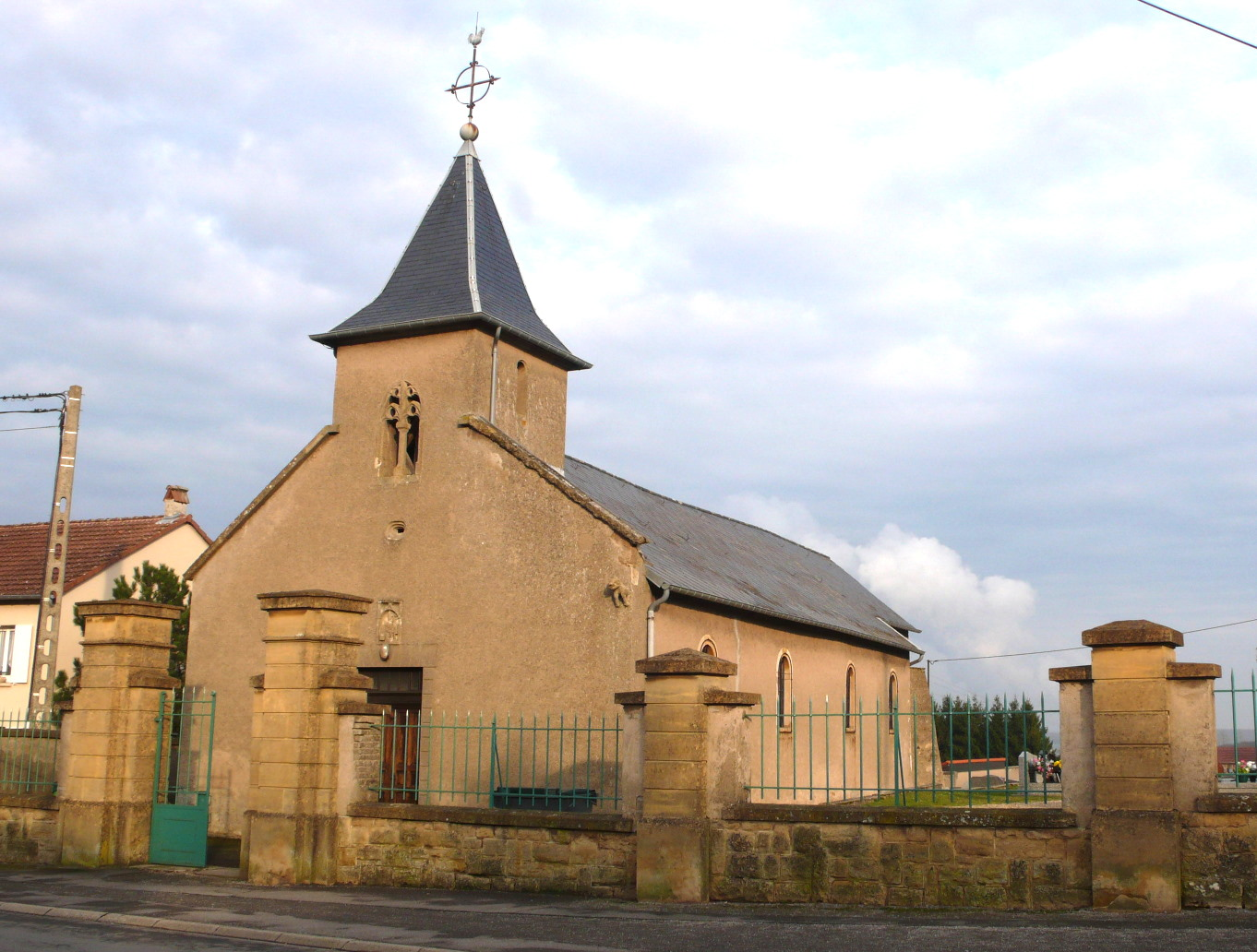 Entrange